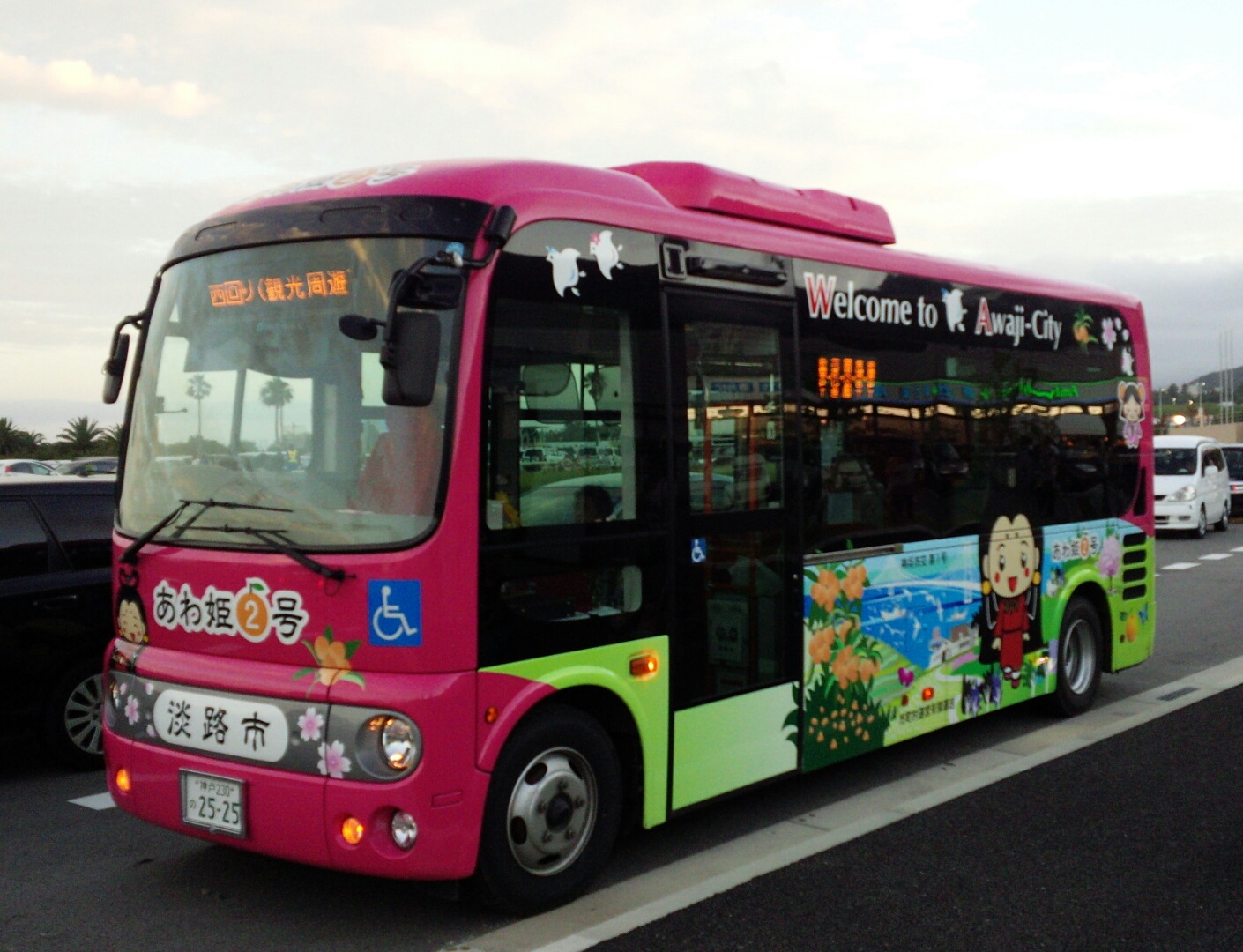 淡路市北部生活観光路線バス「あわ神あわ姫バス」の「あわ姫２号」日野・ポンチョ